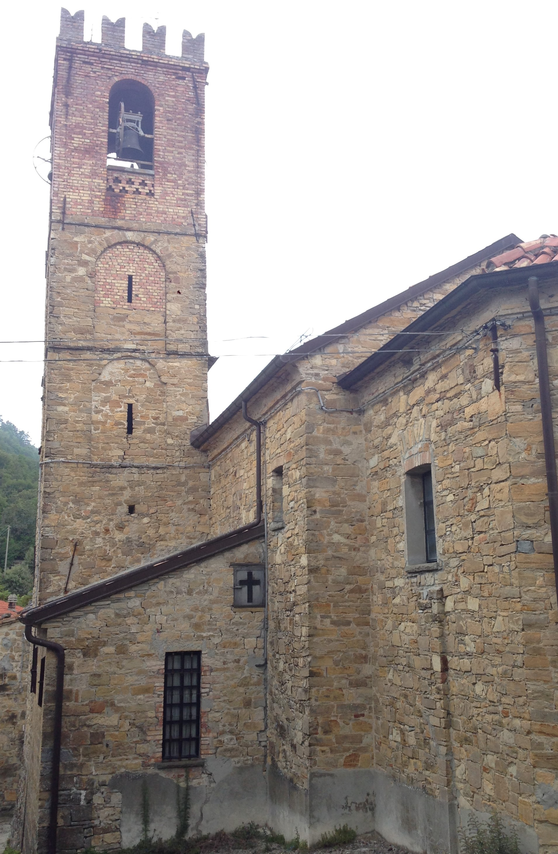 Iglesia entre Fornovo di Taro y Cassio